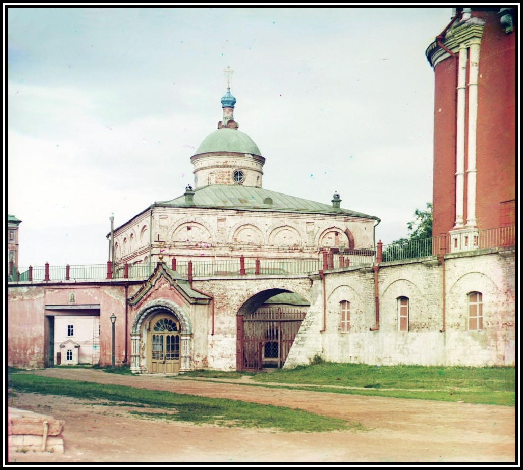 Архангельский собор Рязанского кремля. Фотограф Прокудин - Горский 1912 г.